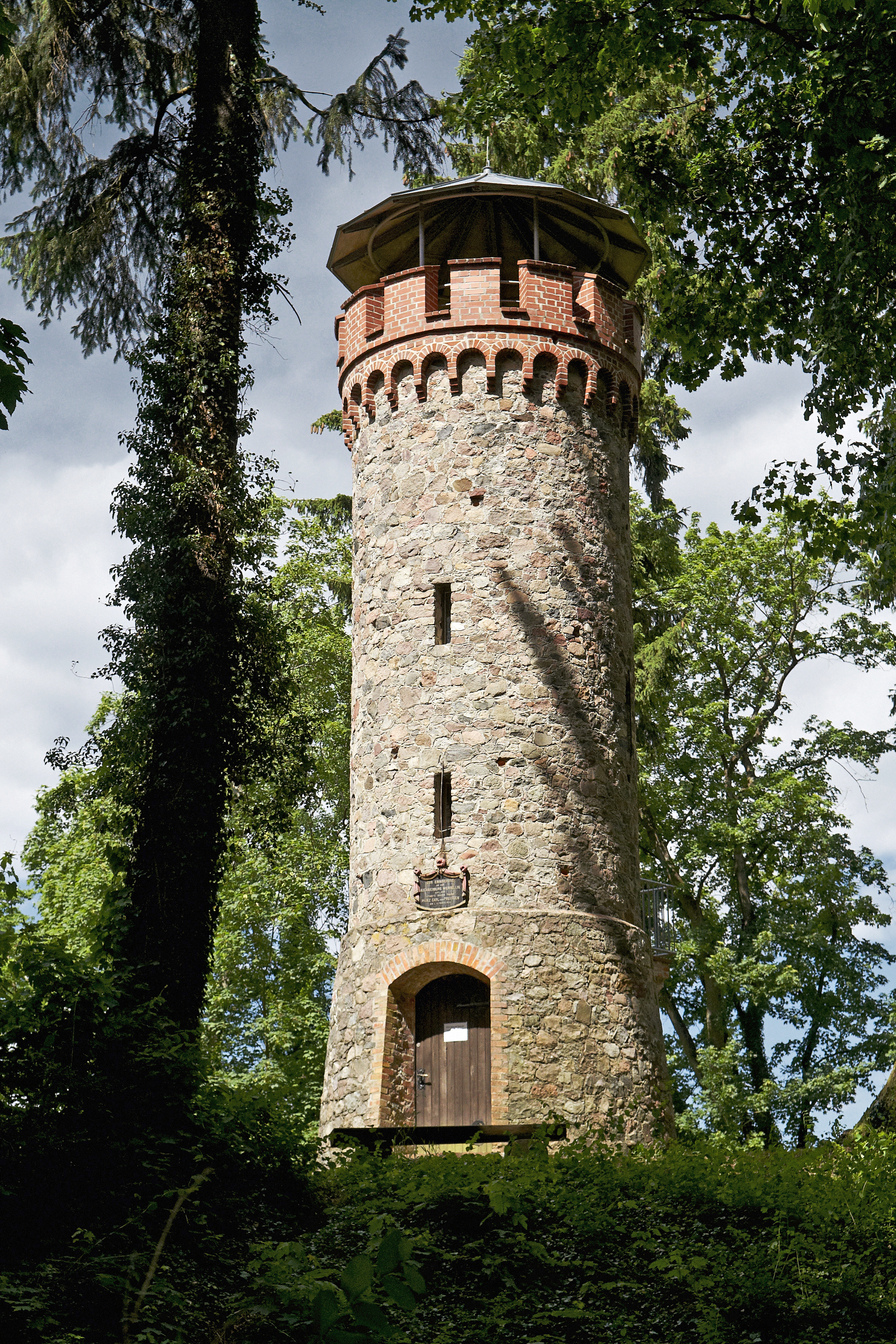 Der Askanierturm in Eichhorst